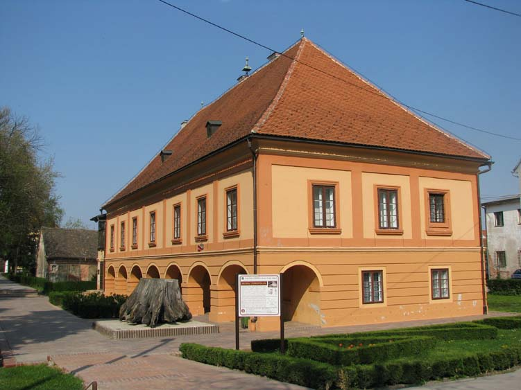 Muzej Turopolja, Velika Gorica